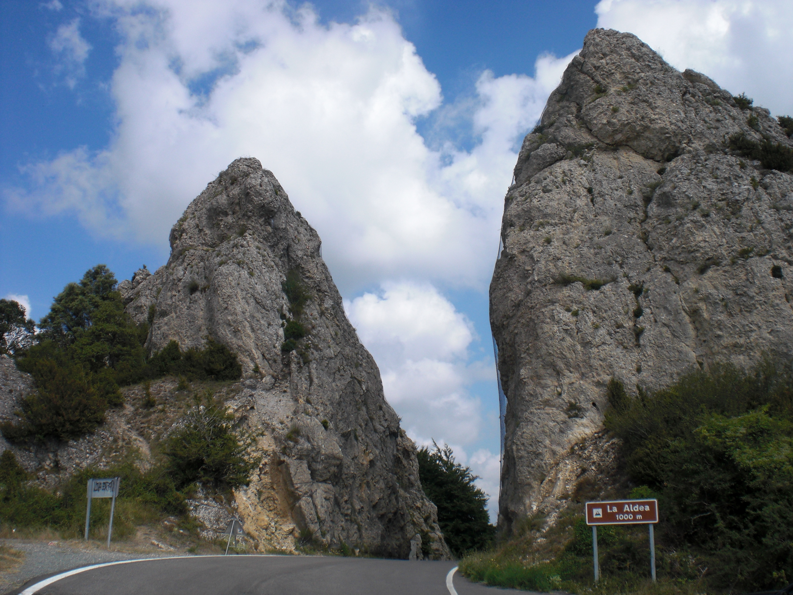 Bernedoko mendatearen gaina.